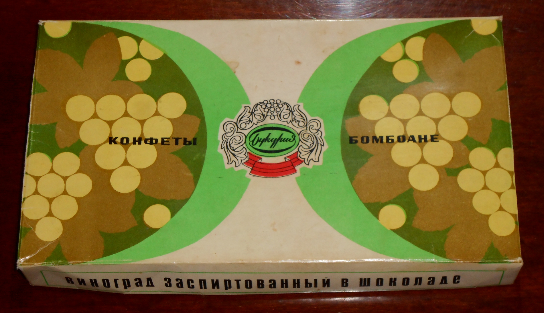 Опытно-экспериментальная кондитерская фабрика "Букурия". Город Кишинёв. Нетто 550 грамм. ГОСТ 4570-73. Цена 4 руб. 30 коп. Коробка конфет произведена ещё в МССР, но год не известен.